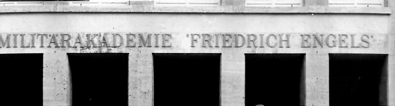 Schriftzug 1989 am Hauptportal der MAFE (Block A), August-Bebel-Straße, Dresden-Strehlen